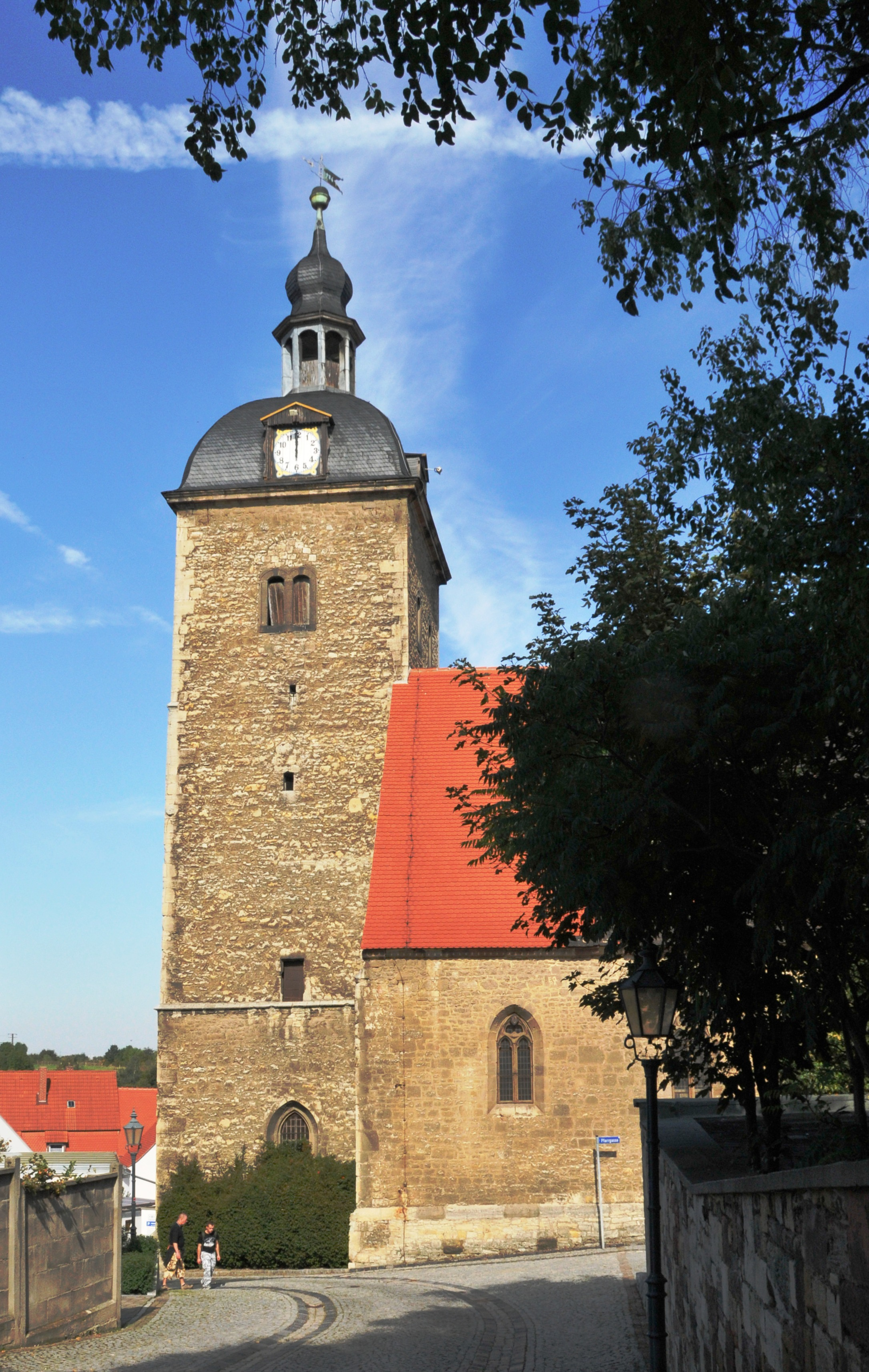 Mücheln, Jakobikirche